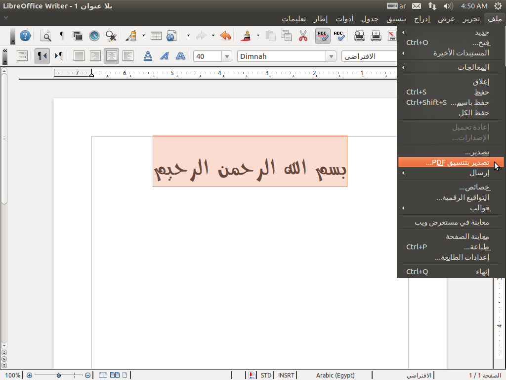 لقطة لبرنامج ليبر أوفيس رايتر